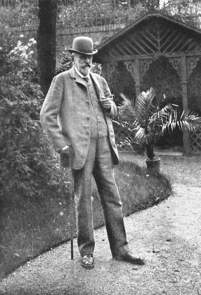 Česky: Hanuš Schwaiger (1854—1912)